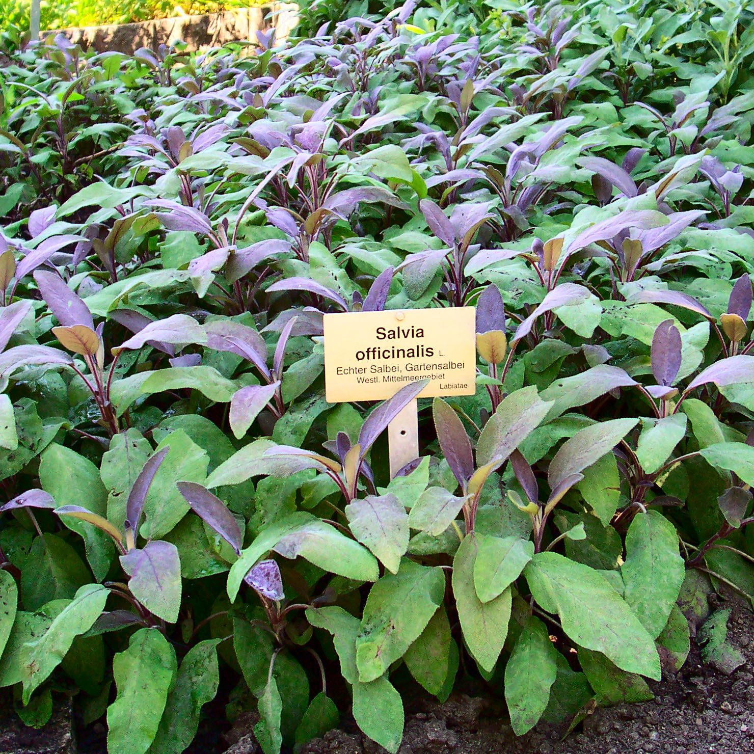 Salvia officinalis, Echter Salbei, Gartensalbei